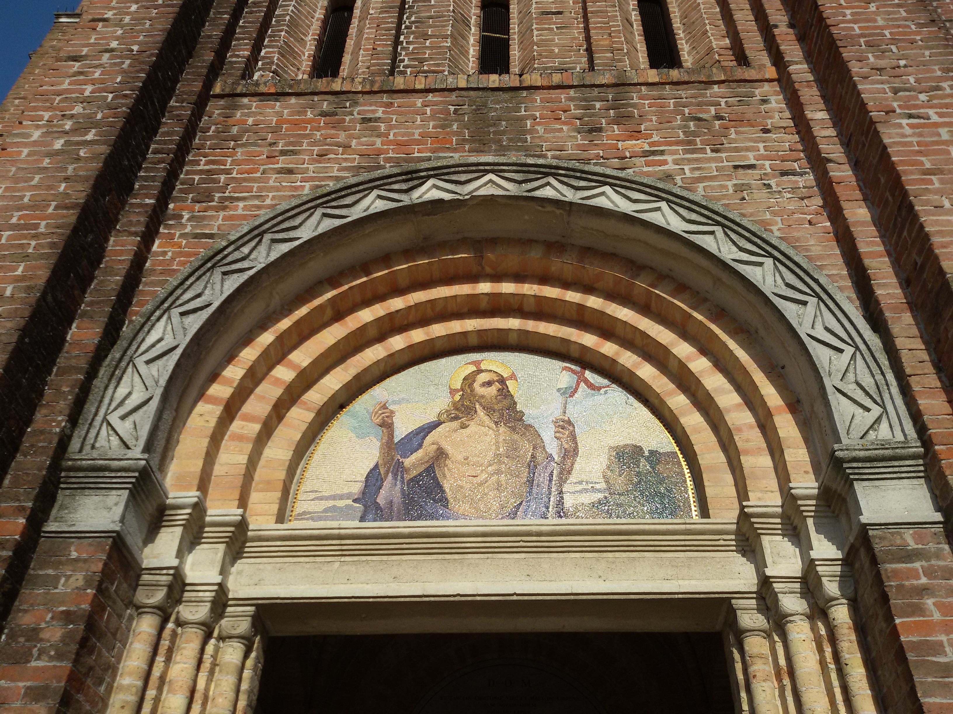 Chiesa di Santa Cristina Quinto di Treviso